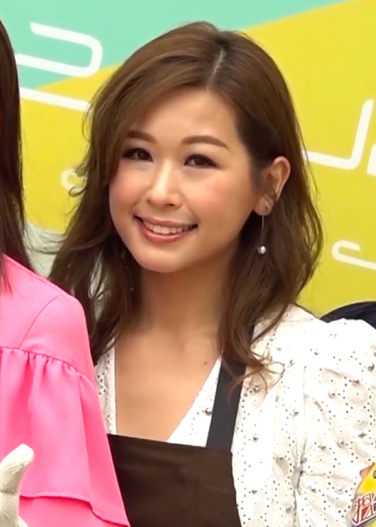 中文（香港）: 2007年回流香港後曾參加香港小姐競選，2008年則入讀第22期無綫電視藝員訓練班，成為無綫電視經理人合約藝員